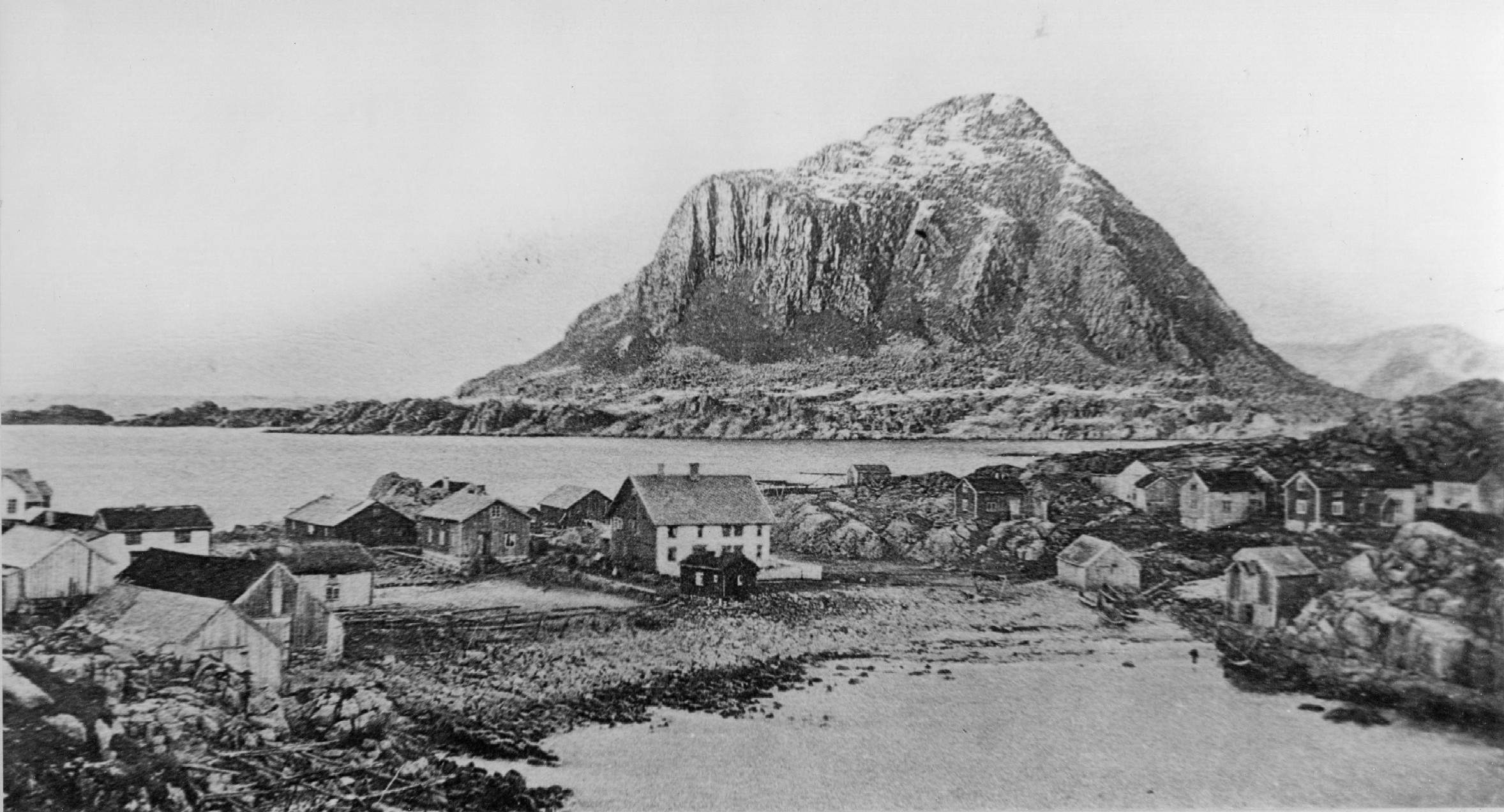 Bilde tatt fra Tarvågen på Litløya, mot Gaukværøy, en gang på 1800-tallet. Fotograf ukjent.